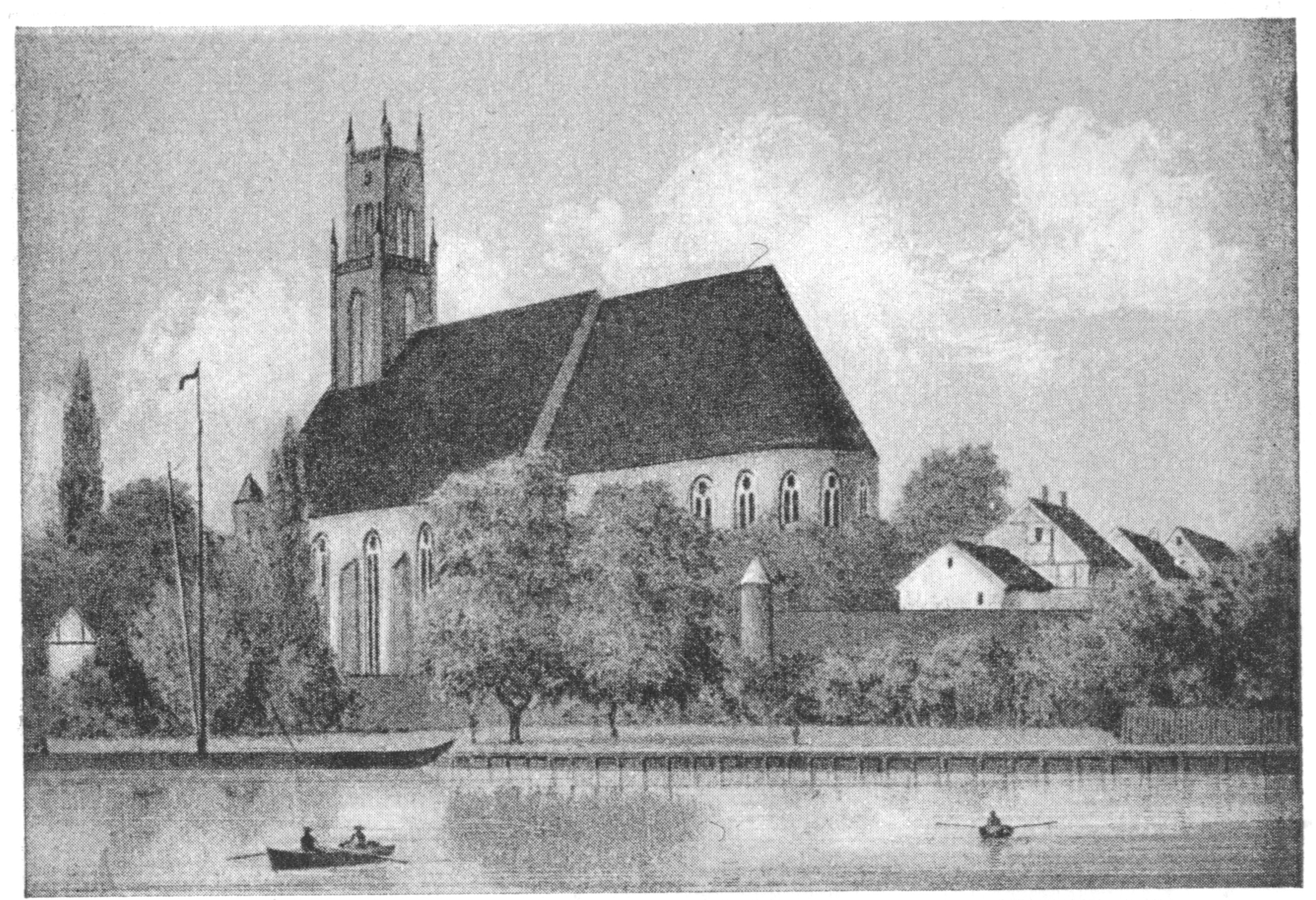 Klosterkirche Sankt Trinitatis Neuruppin um 1860 nach dem Abbruch der Turmspitze